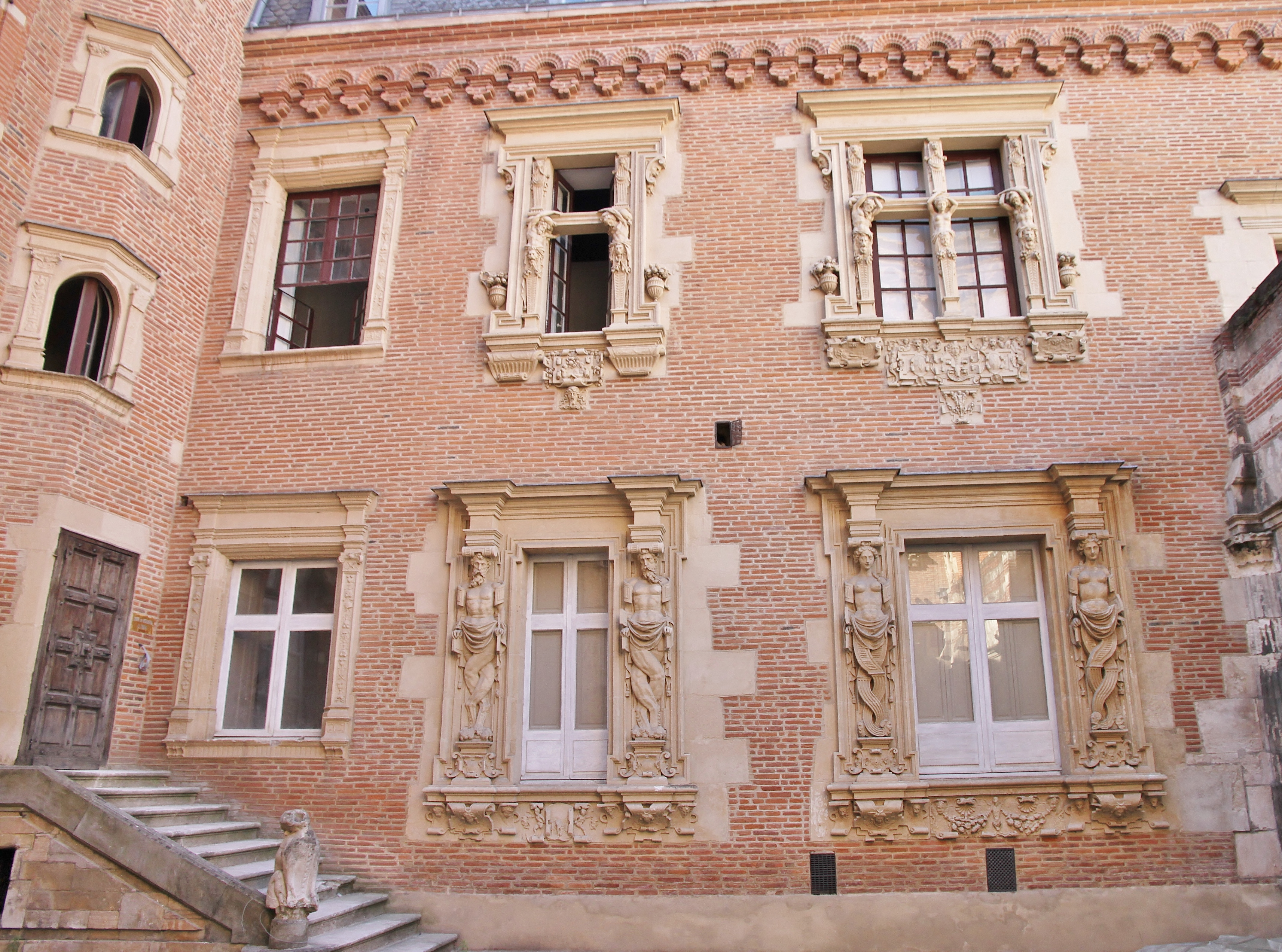 Hôtel du Vieux-Raisin (Renaissance, Toulouse)